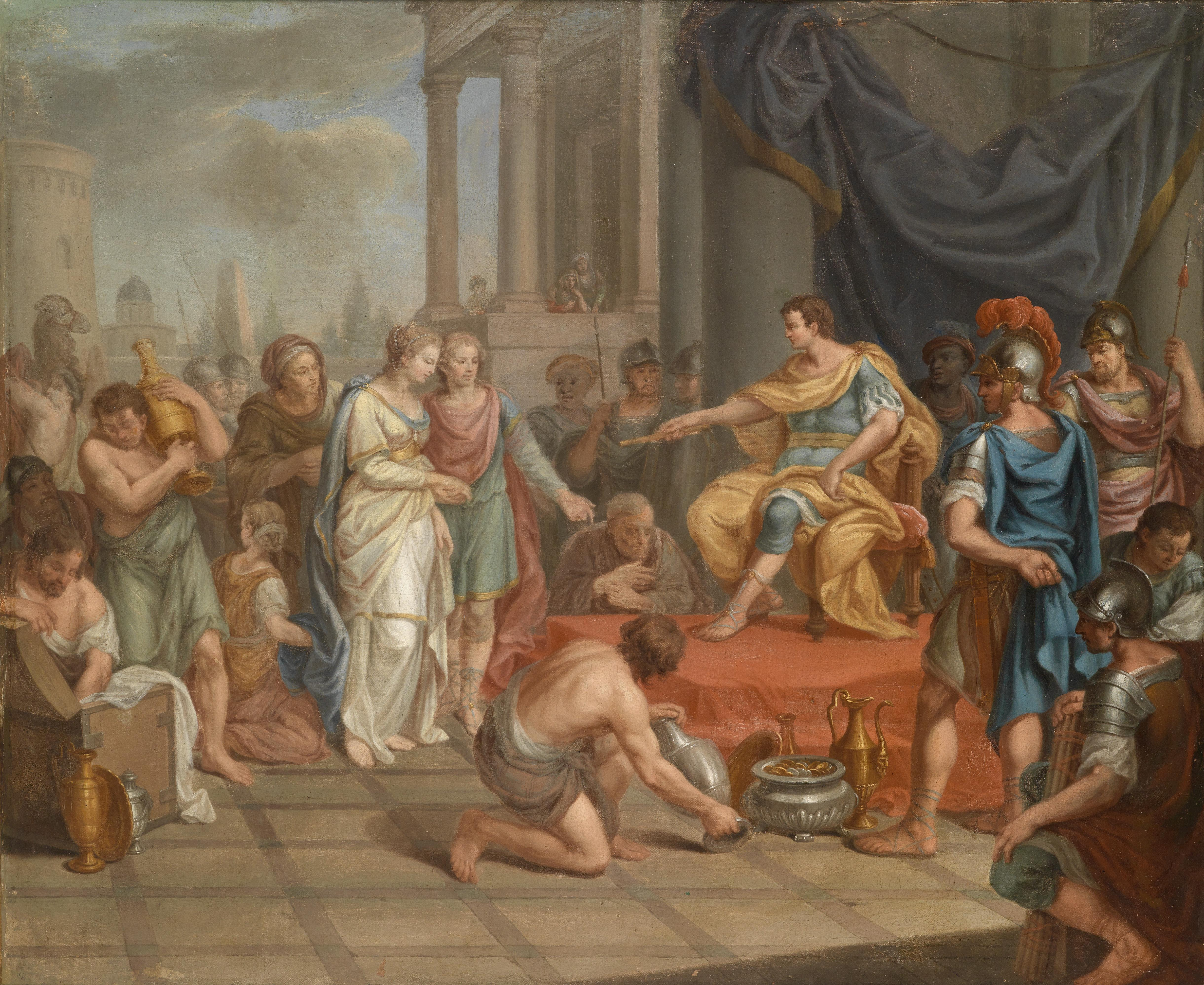 Die Enthaltsamkeit des Scipio (nach Livius XXVI, 50), signiert und datiert unten links: G. Fuchs/inv. et pinxit/1770, Öl auf Leinwand, 84 x 101 cm